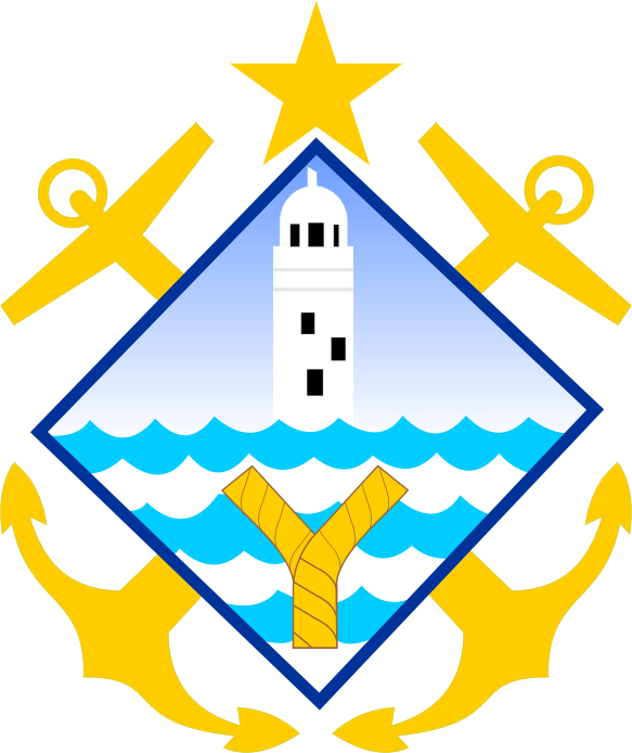 Escudo de la ciudad de Progreso, Yucatán, México